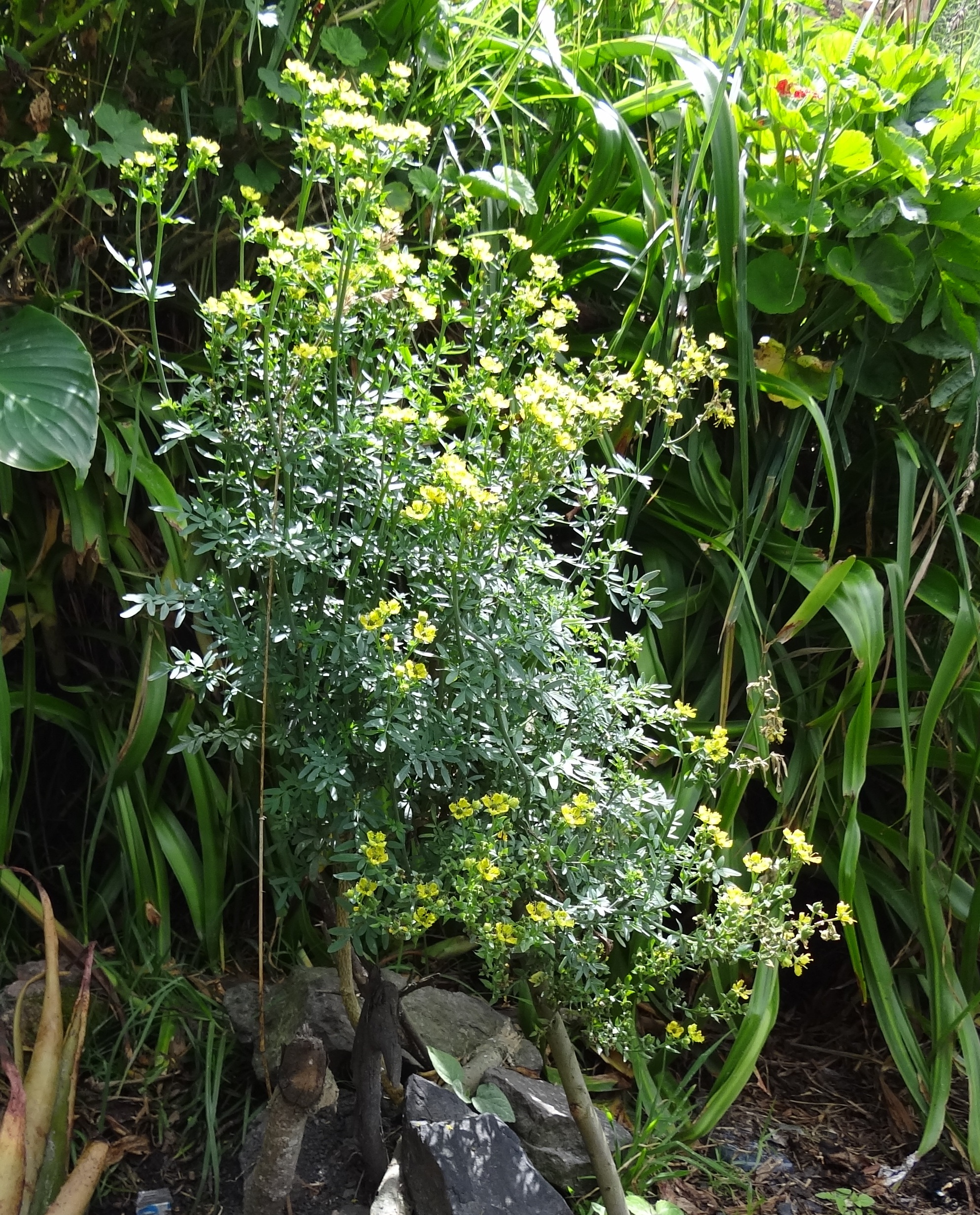 Arbol de ruda (Ruta graveolens)